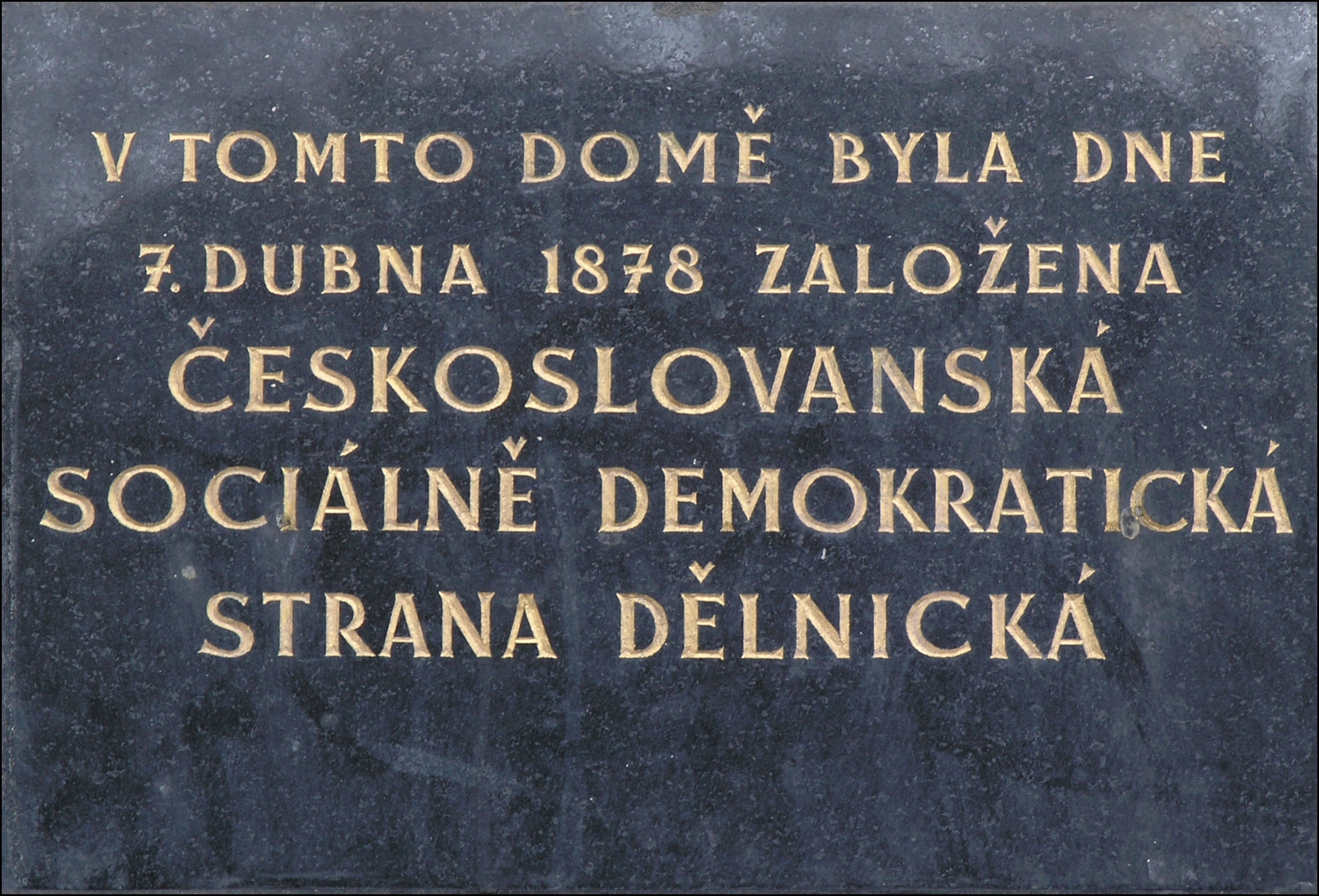 Kulturní dům Kaštan v Praze 6, Břevnově - pamětní cedule upomínající na založení Českoslovanské sociálně demokratické strany dělnické